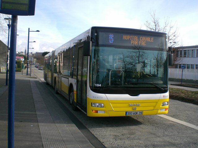 Liane 5 circulant sur l'axe nord/sud